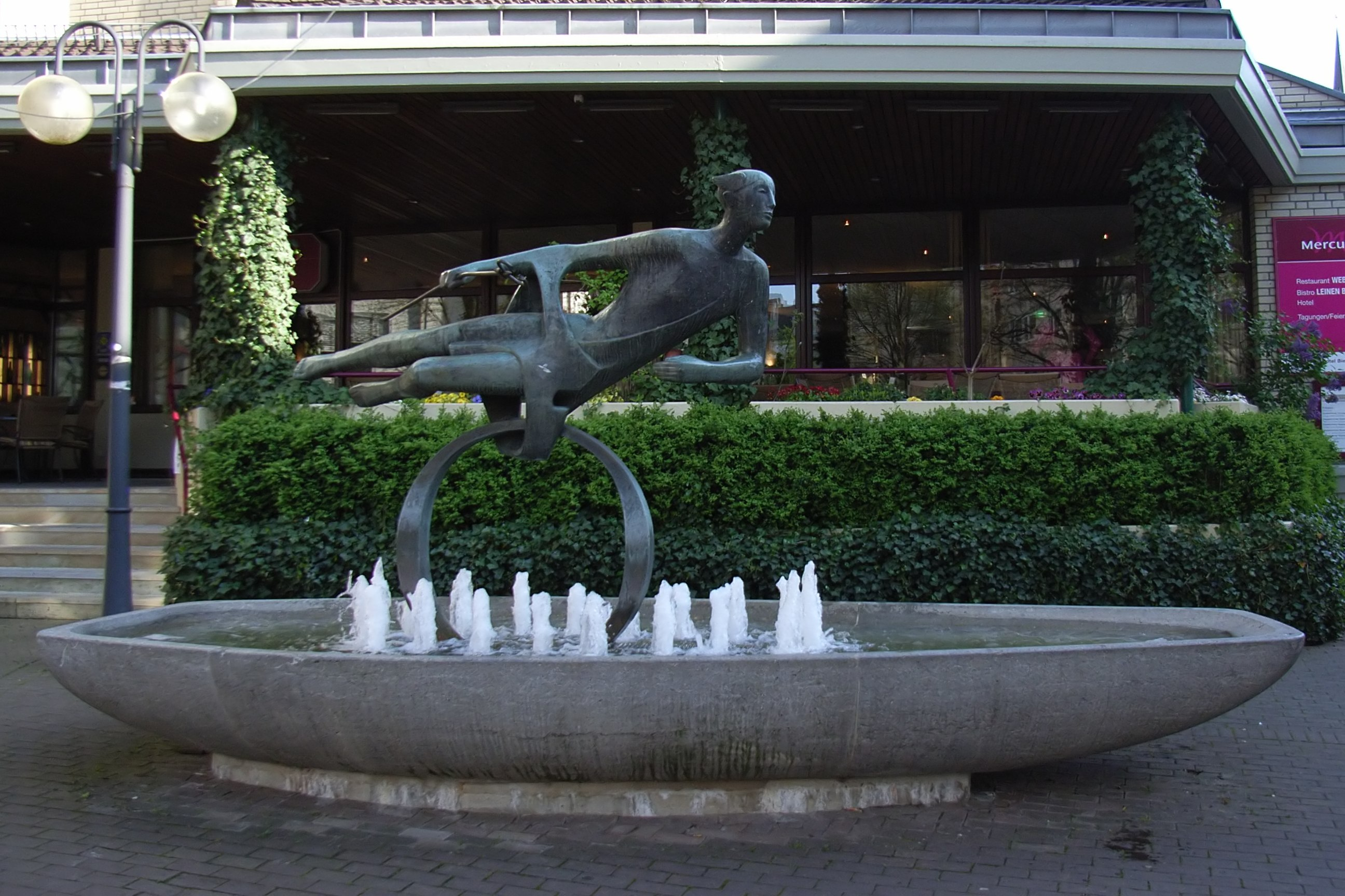 Bielefeld, Deutschland: Merkurbrunnen.